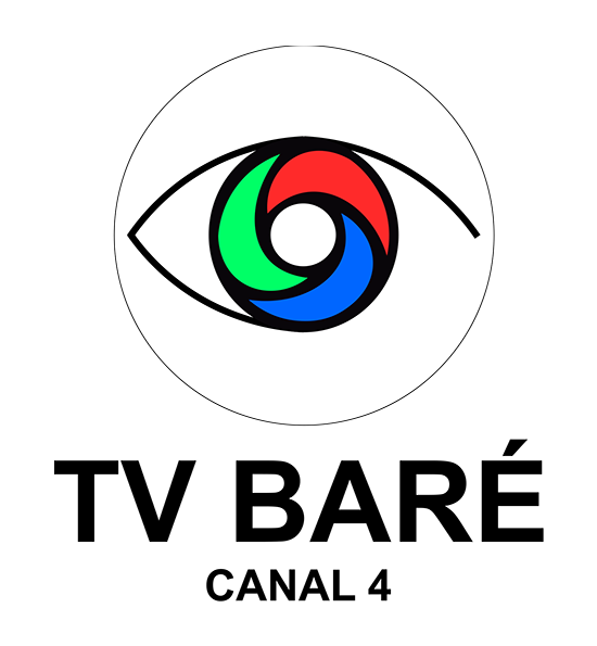 Logotipo da TV Baré, emissora de televisão sediada em Manaus - AM, Brasil, utilizado até 1986